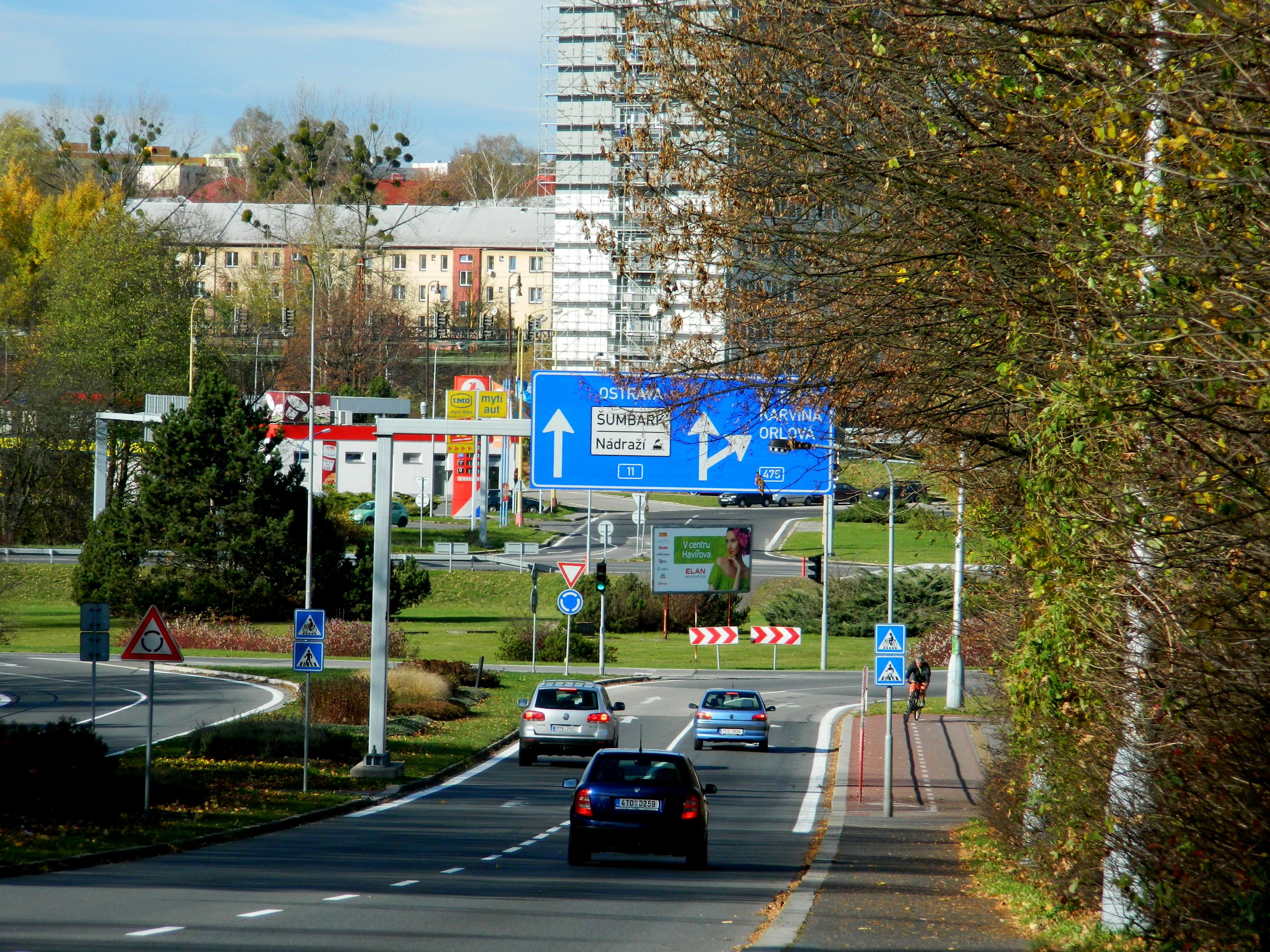 Silnice 11 na Hlavní třídě v Havířově, směr Ostrava. V pozadí je viditelný velký kruhový objezd.